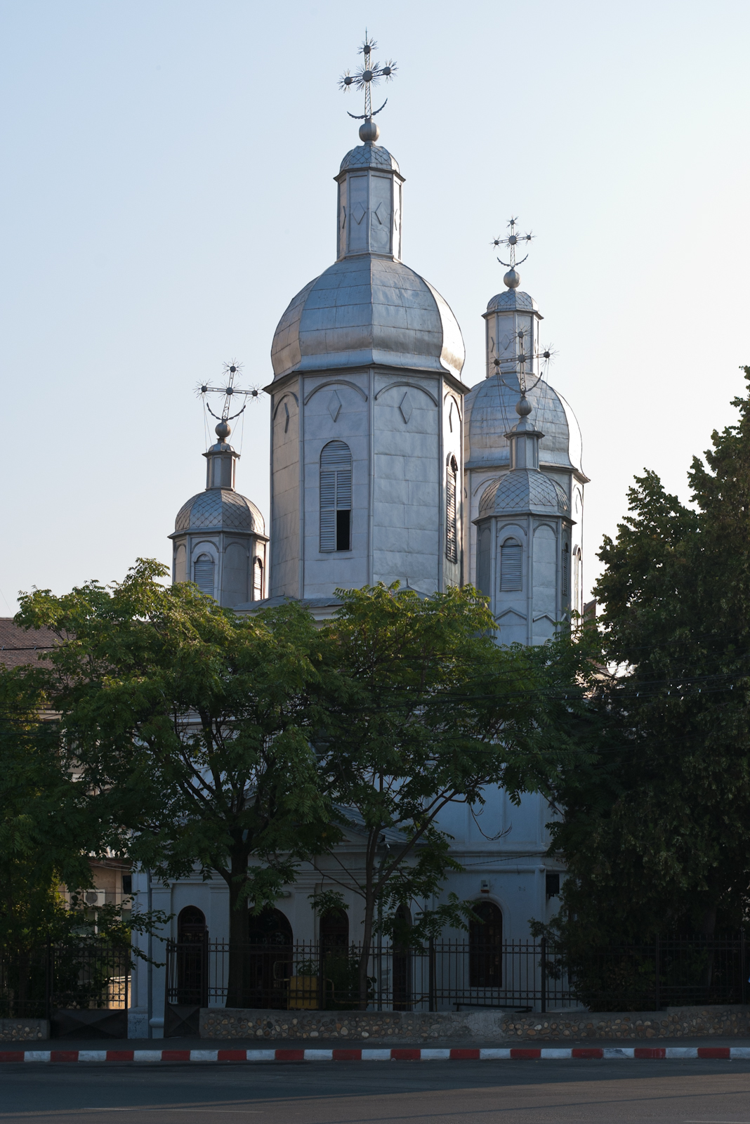 Fotografia prezinta Biserica "Sf. Ilie" din Pitesti, vazuta dinspre S (intersectia str. Fraţii Goleşti cu str. C.A. Rosetti)